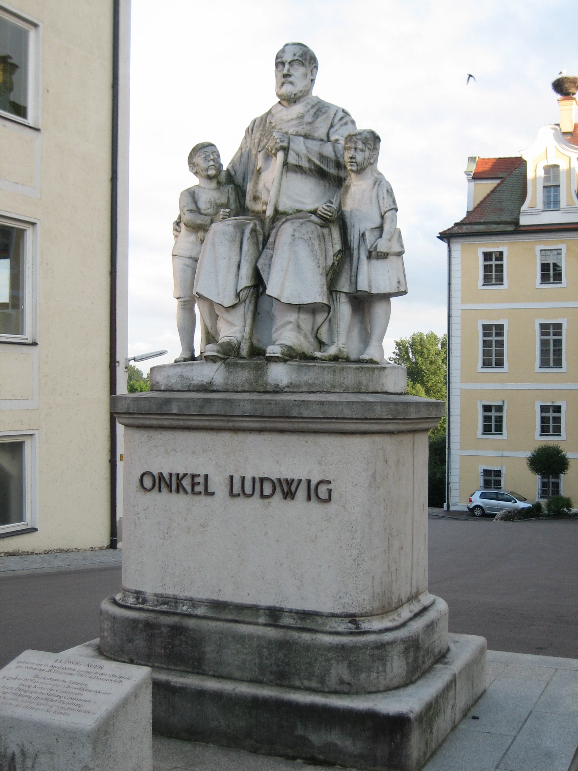 Ludwig-Auer-Denkmal von Bildhauer Eugen Mayer-Faßold in Donauwörth